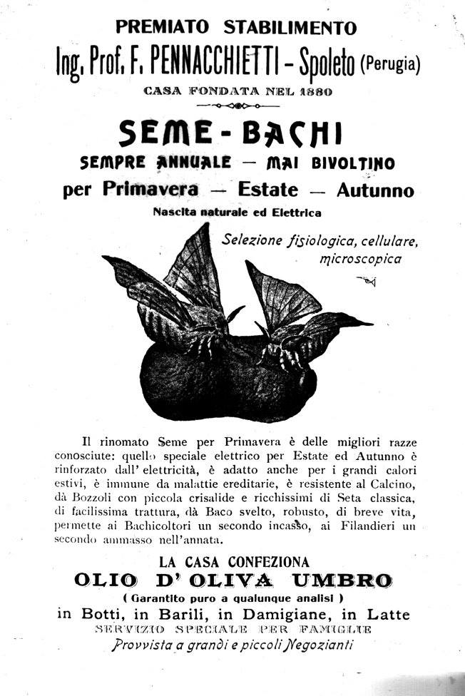 Volantino pubblicitario dello Stabilimento Bacologico Pennacchietti di Spoleto, fondato nel 1880